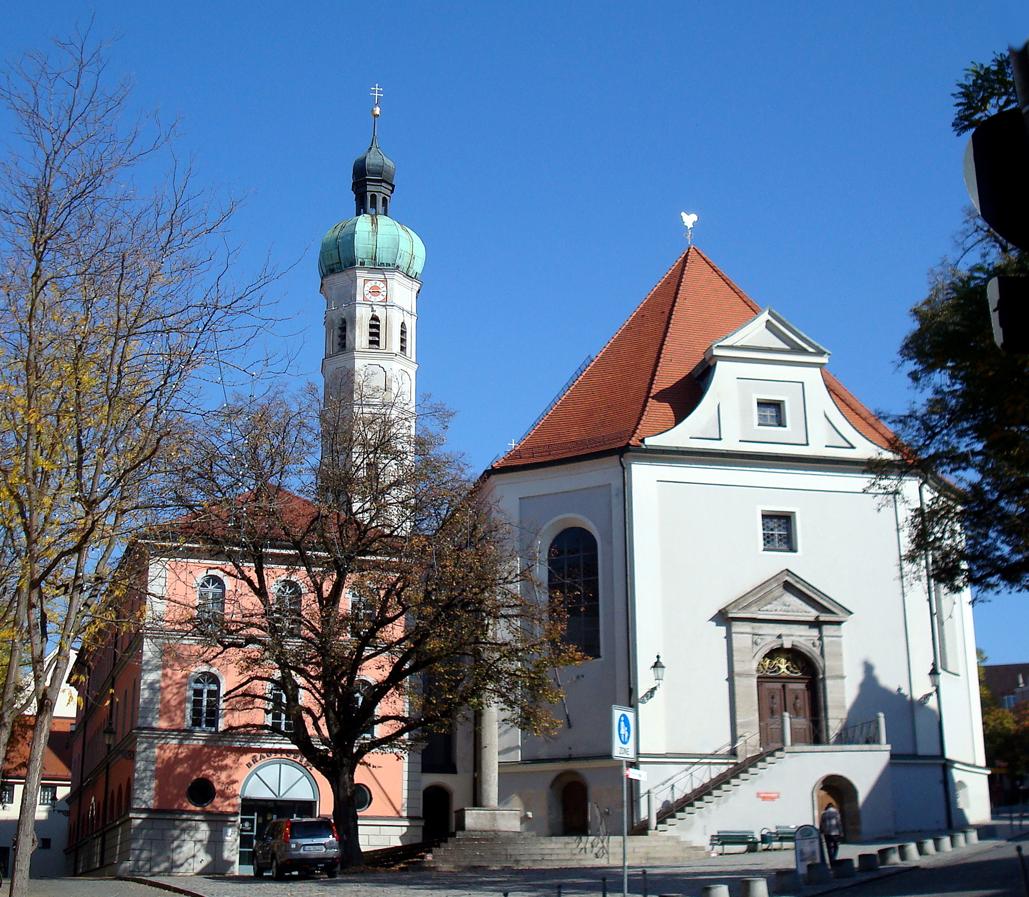 Dachau, Schrannenplatz. Die ehemalige Kirchenschule, die zur Markthalle umgebaut wurde, befindet sich auf der linken Seite des Platzes; rechts von ihr die Stadtpfarrkirche St. Jakob.